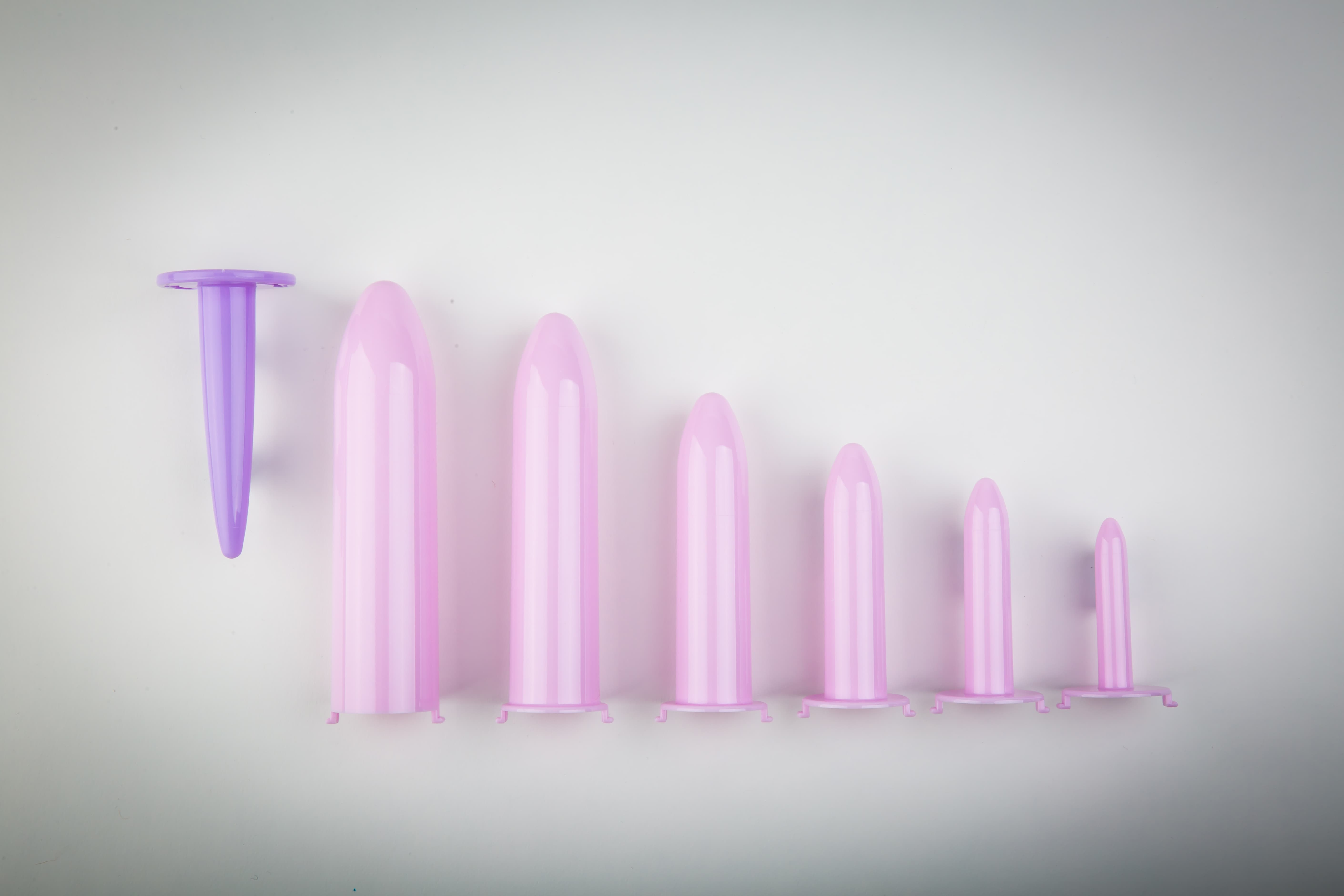 Dilatateurs vaginaux (à tailles gradués) utilisés dans le traitement du vaginisme.